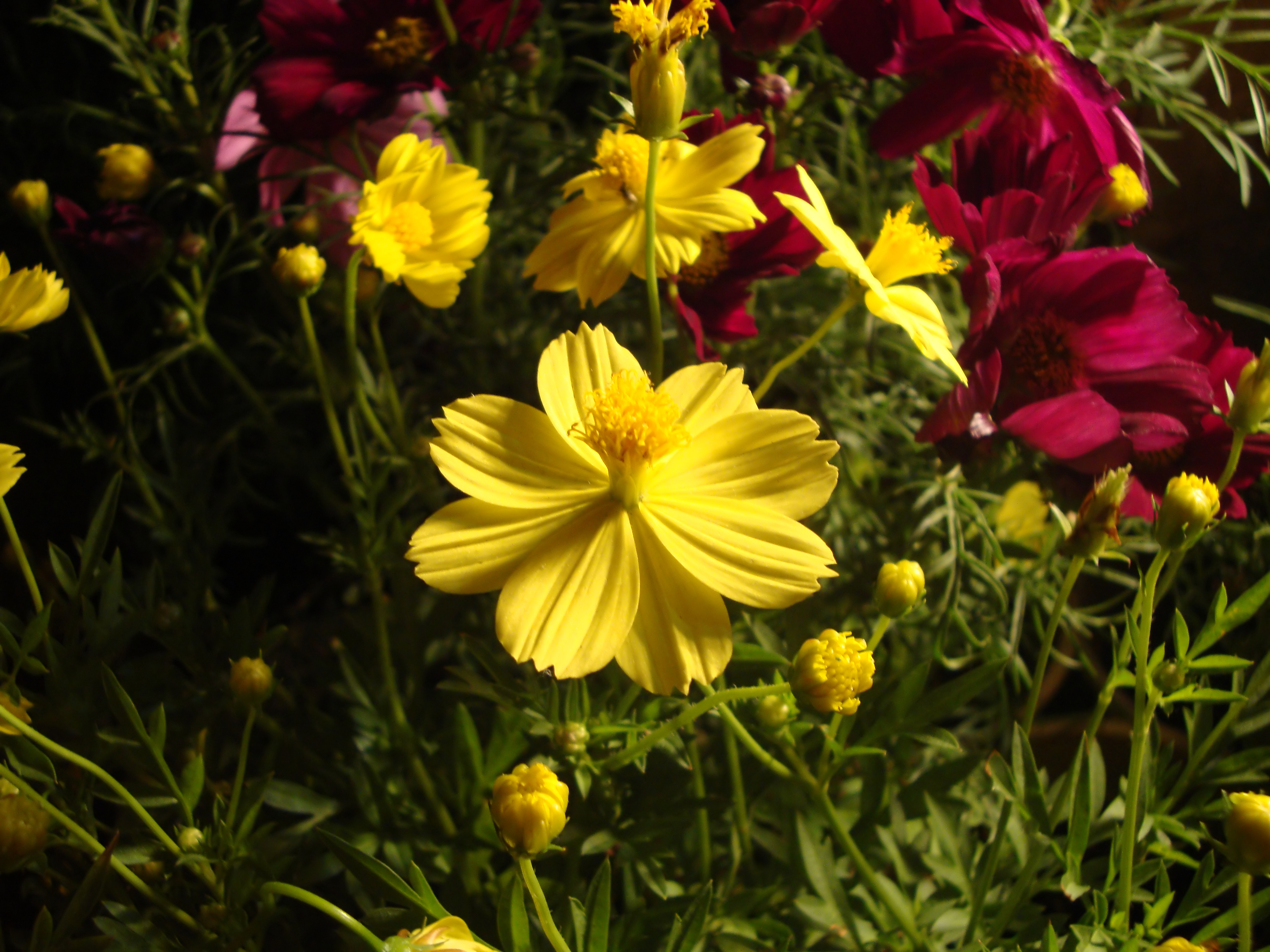 Cosmos sulphureus Cav., 1791